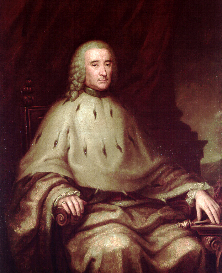 Dipinto del doge Rodolfo Brignole Sale (1765-1767)